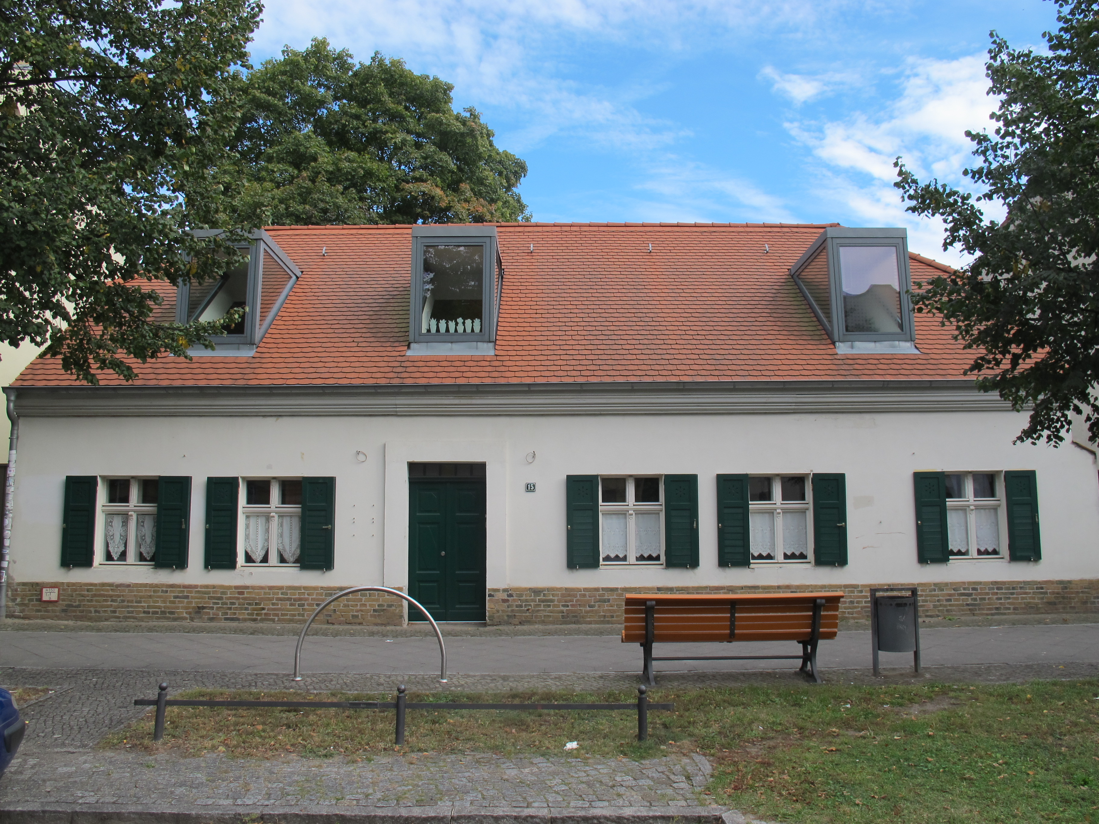 Potsdam in Brandenburg. Das Haus in der Karl-Liebknecht-Straße 15 in Babelsberg steht unter Denkmalschutz.